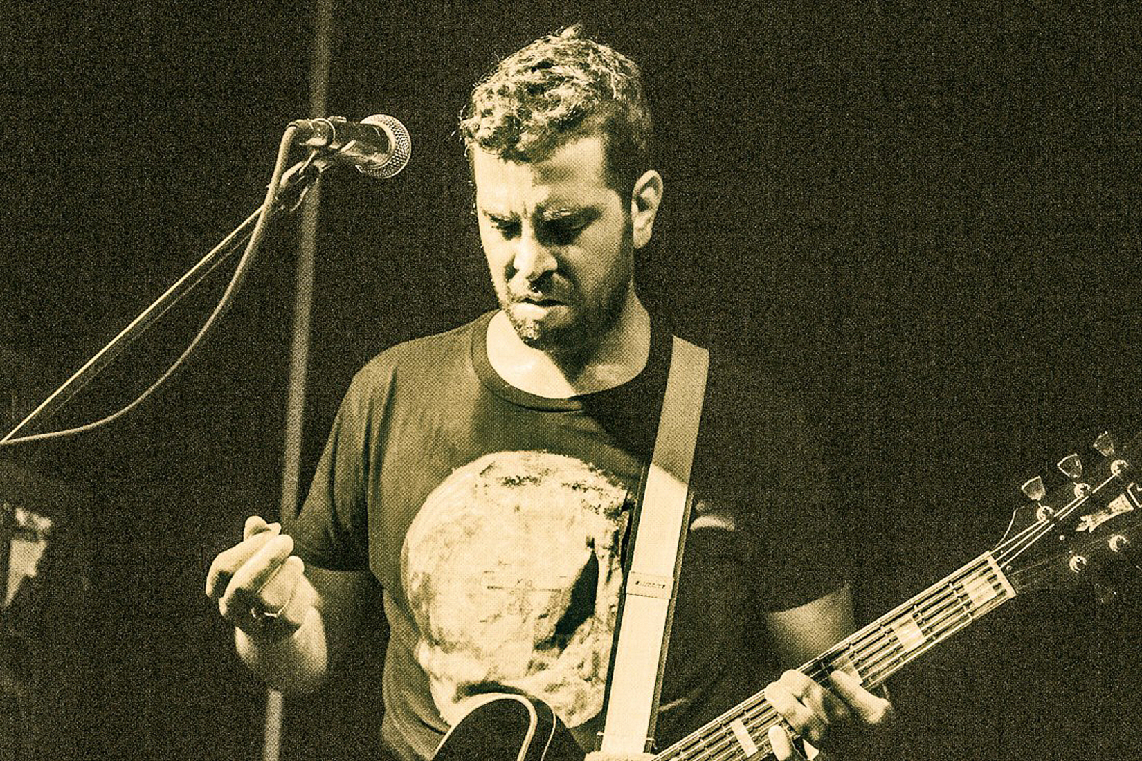 מתוך הופעה ברוטשילד 12